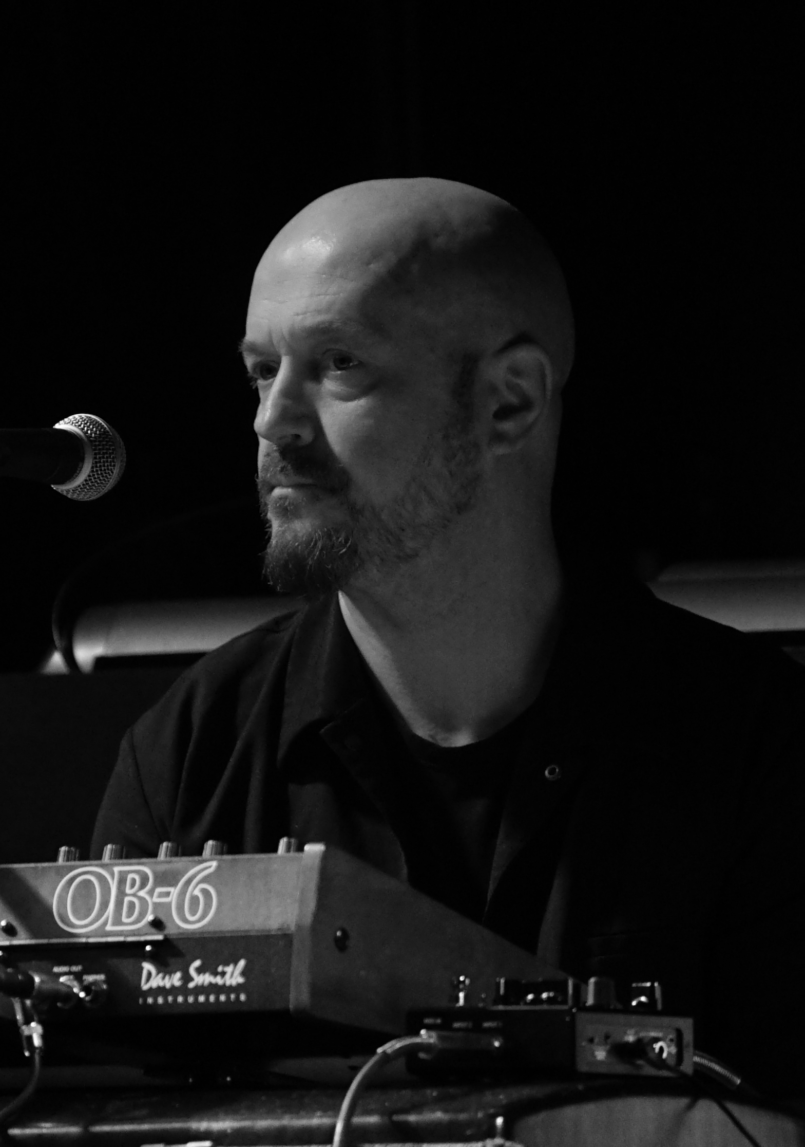 en concert à la Cartonnerie de Reims.